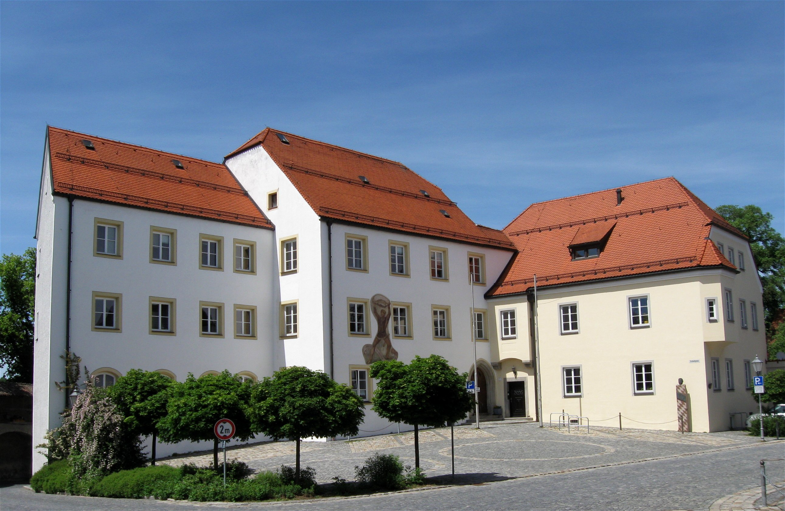 Schloßplatz 1; Landratsamt; Ehem. Schloss, zwei- und dreigeschossige Dreiflügelanlage mit Krüppelwalmdächern, im Kern nach Brand 1493, ausgebaut und erneuert in der 2. Hälfte 18. Jh. und 1938. - Alte Schloßgartenmauer an der Bauerngasse, wohl 16. Jh.